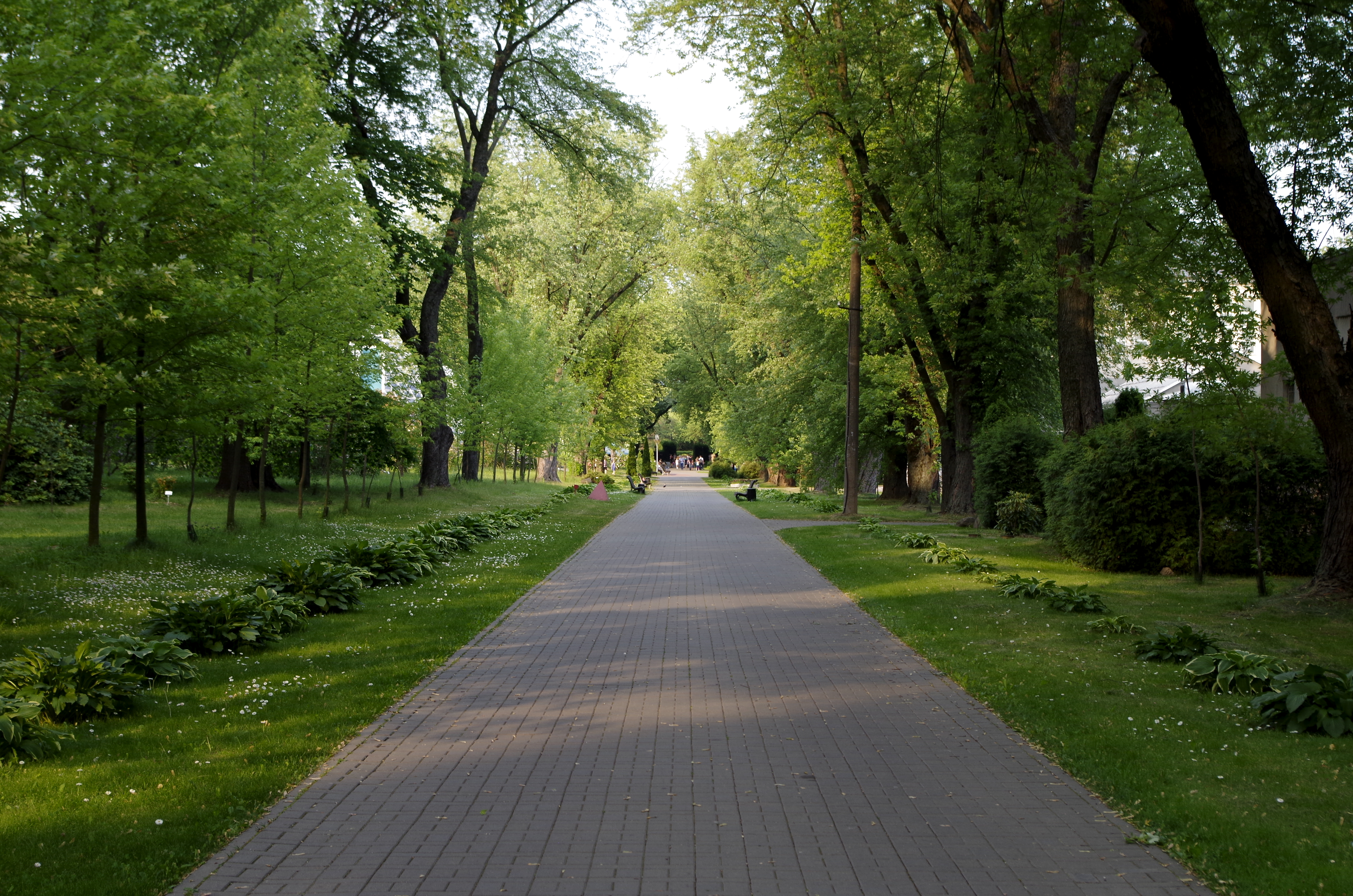 alieja Kliona sierabrystaha, Minsk, Belarus